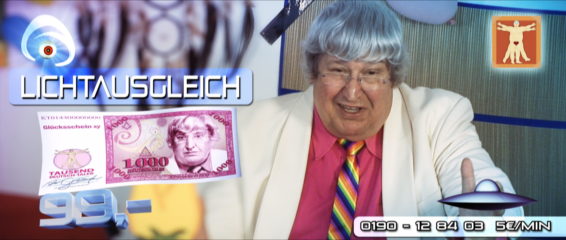 Screenshot aus dem Film "Der Gründer"